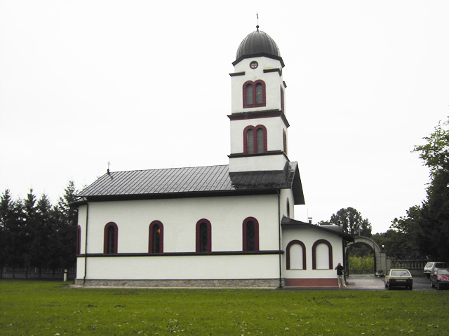 Pravoslavna Crkva u Gornjim Podgradcima Autor: Dalibor Sinik